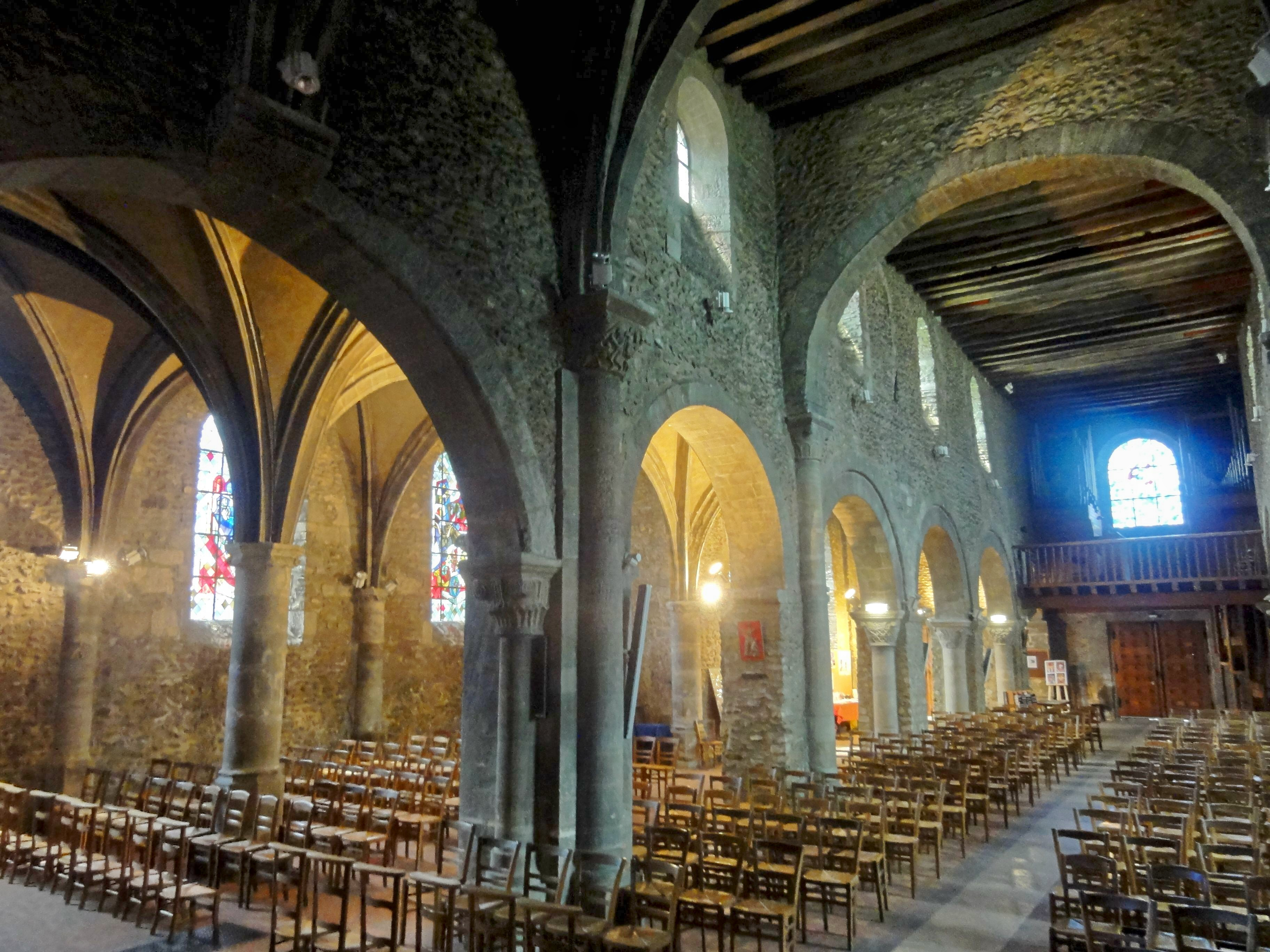 Croisée du transept ; vue vers le sud-ouest.